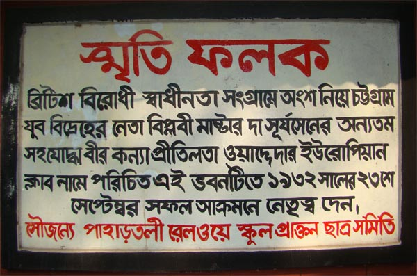 ক্লাবের সন্মূখের স্মৃতিফলক।